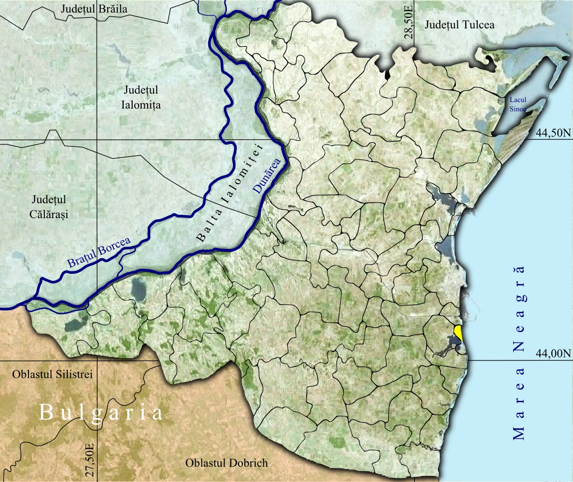 Comuna Agigea Constanta